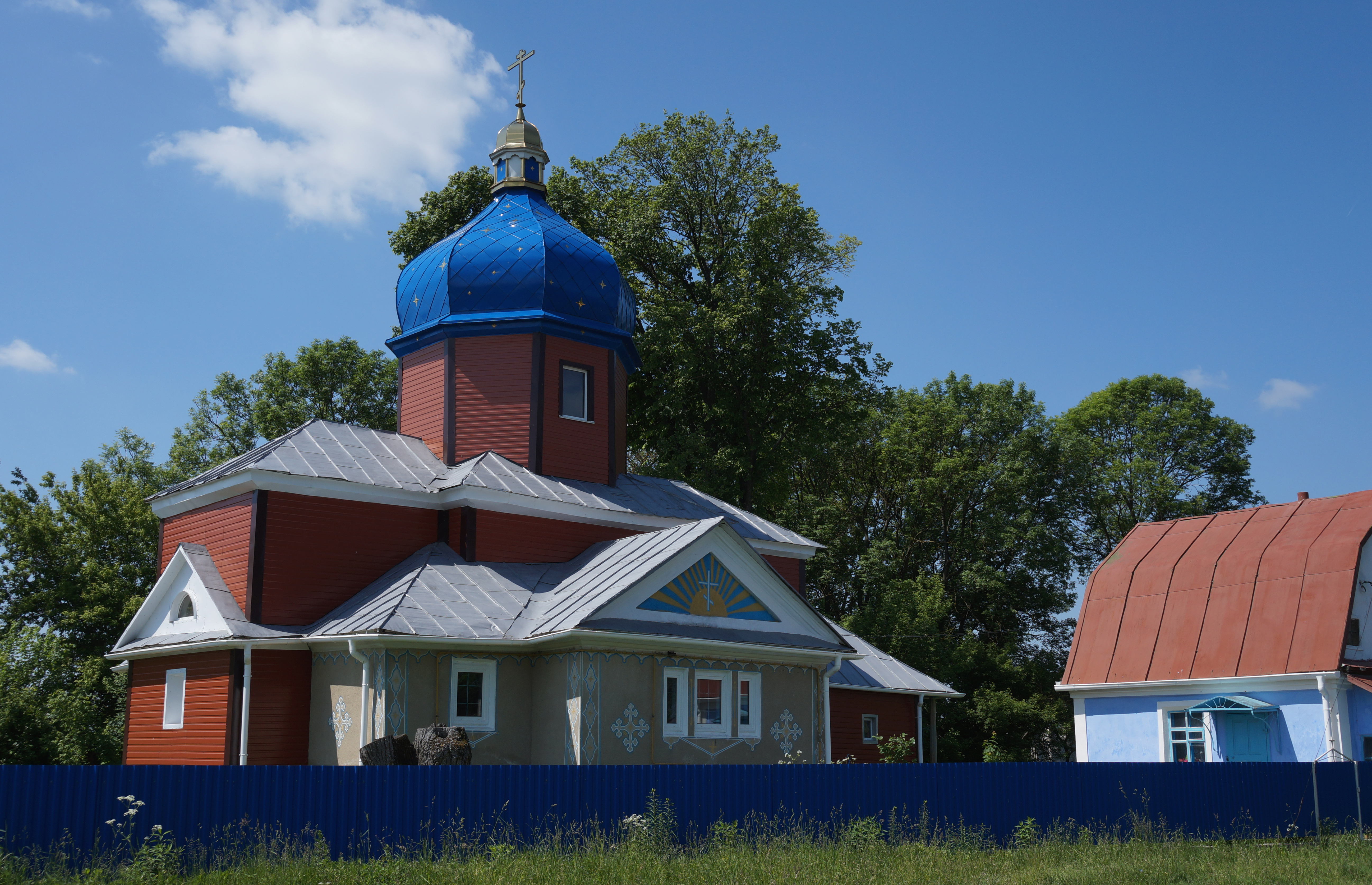 Церква Святого Архістратига Михайла, с. Бубнівка